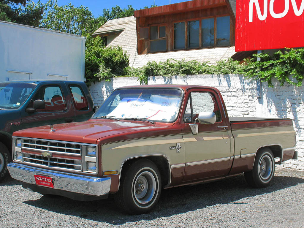 Chevrolet C-10 Silverado 1987